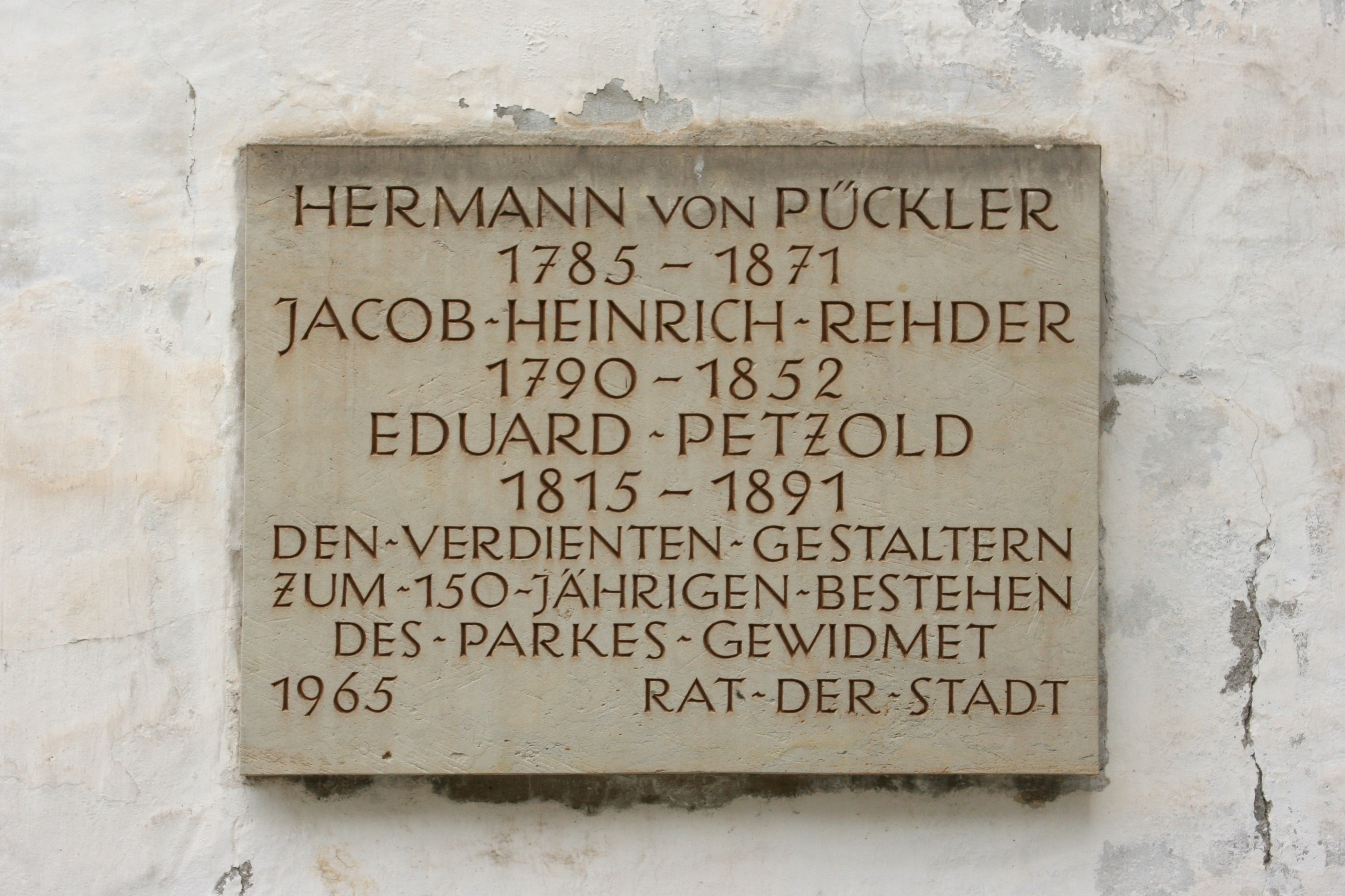 Altes Schloss in Bad Muskau